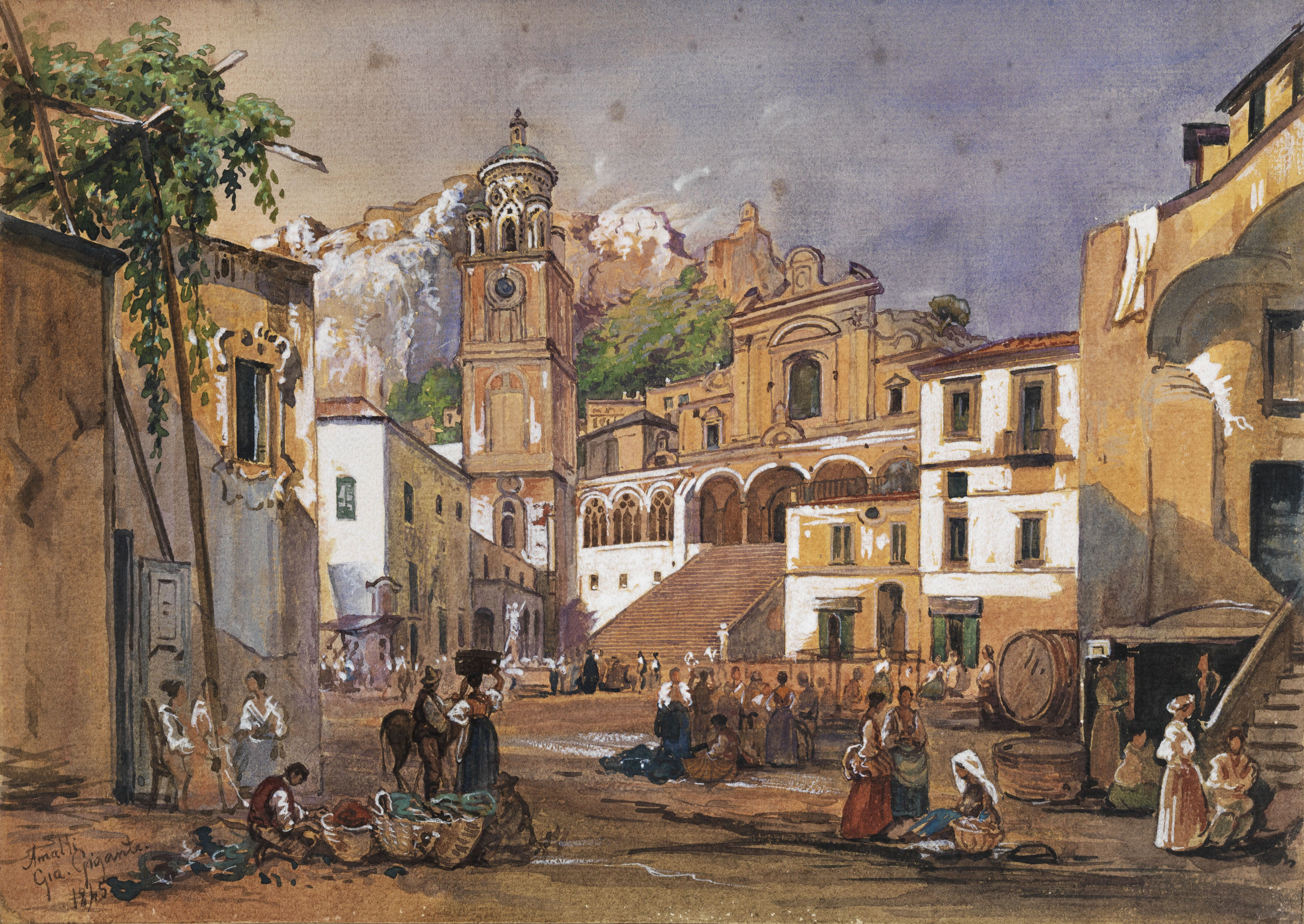 Marktszene in Amalfi. Gouache auf Karton. Sichtmaß: 20,5 x 30 cm. Links unten signiert und ortsbezeichnet "Amalfi" sowie datiert "1845".